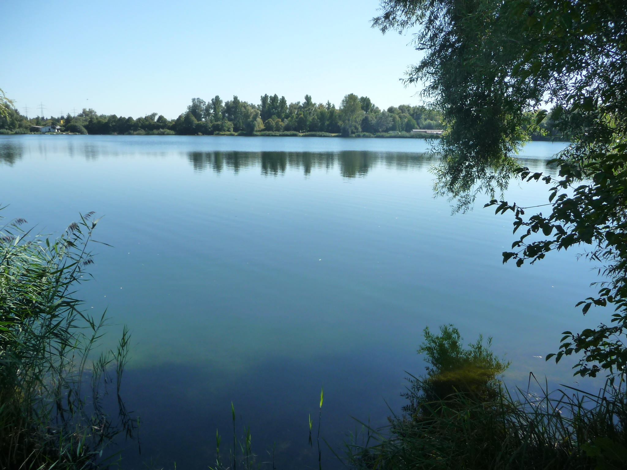 Philippsburg, nördliches Baden-Württemberg